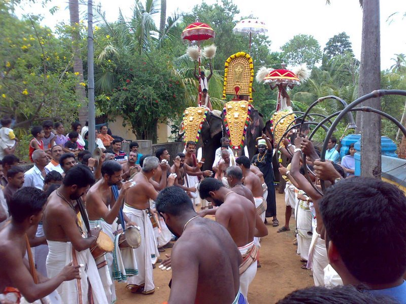 മാത്തൂർ കൂത്തഭിഷേകം എഴുന്നെള്ളിപ്പ്.